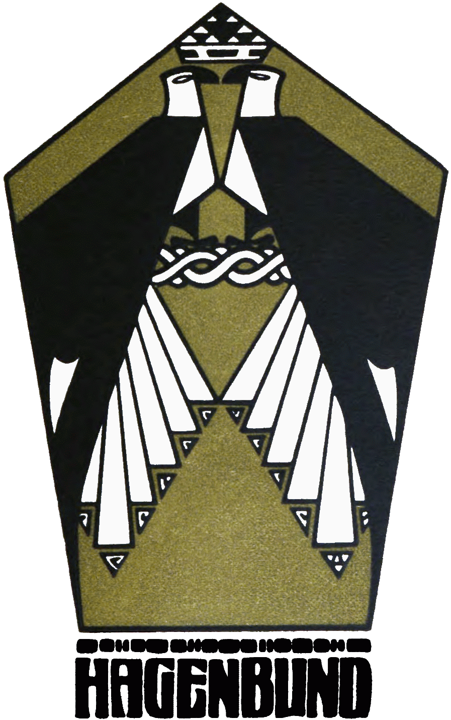 Plakatmotiv der Ausstellung (November 1904 - Jänner 1905) des Künstlerbundes Hagen in Wien